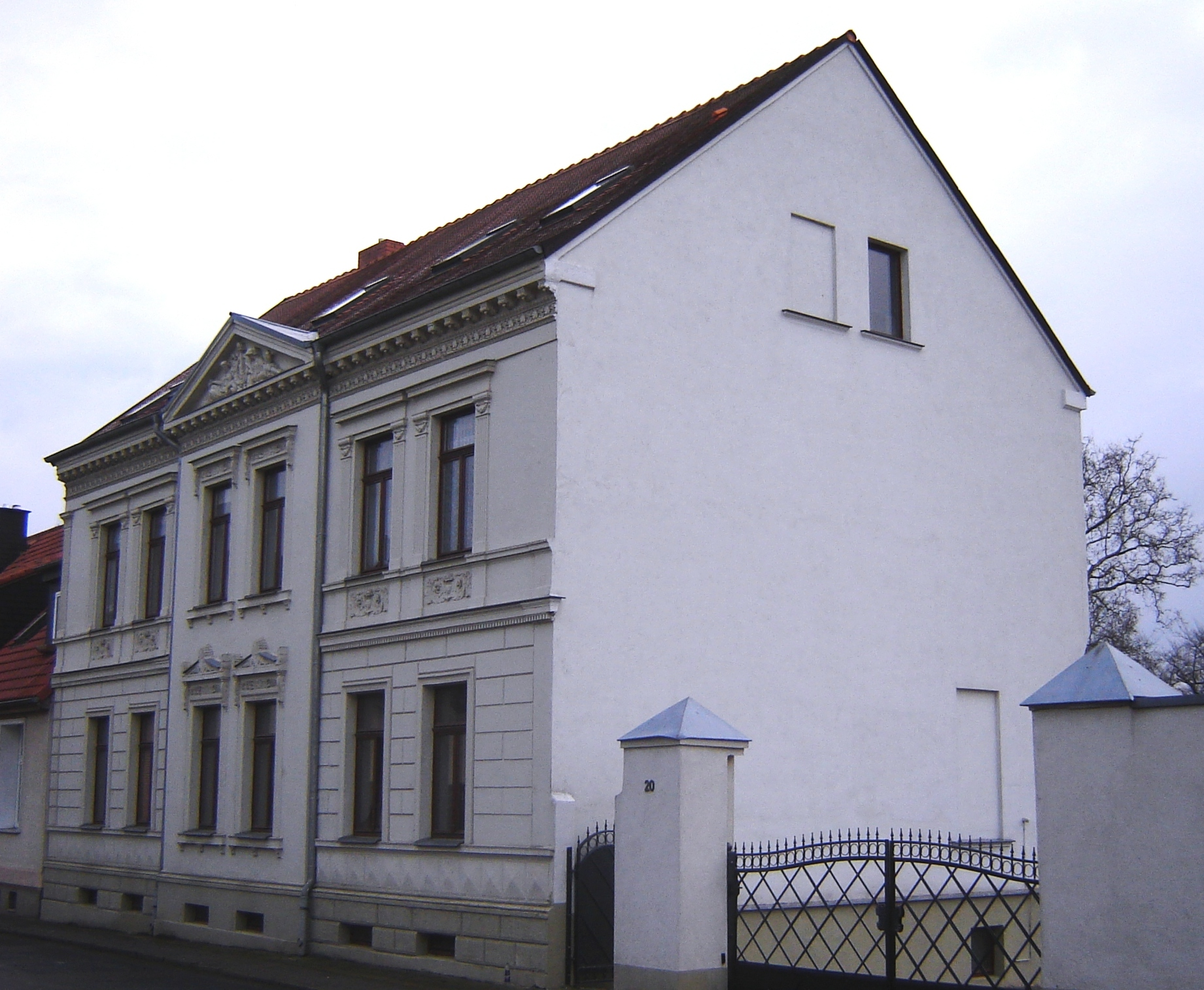 Magdeburg-Ottersleben, Alt Ottersleben 20 (Kulturdenkmal)